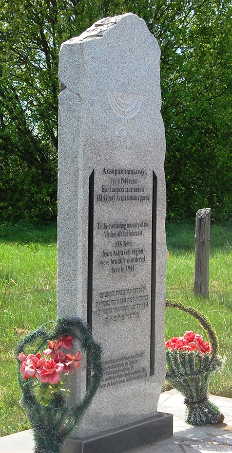 Памятник убитым во время Холокоста евреям в деревне Михалишки Островецкого района. Установлен 22 июня 2009 года на старом еврейском кладбище.